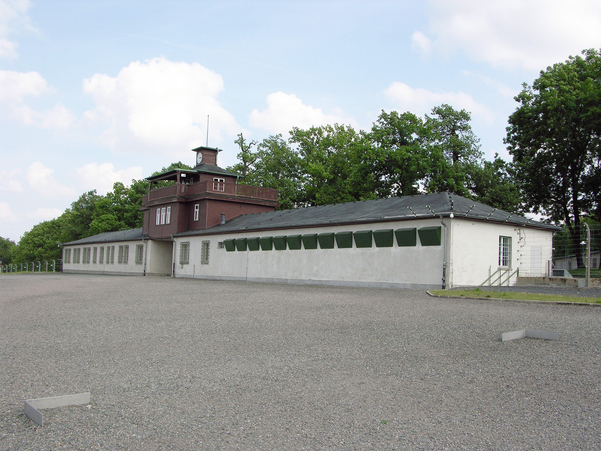 Gedenkstätte Buchenwald, Arrestgebäude ("Bunker"), hier wurde Pfarrer Paul Schneider über ein Jahr lang in Einzelhaft eingesperrt und misshandelt. Die Verdunklungskästen vor den Zellenfenstern wurden allerdings erst nach dem Tod von Paul Schneider angebracht.